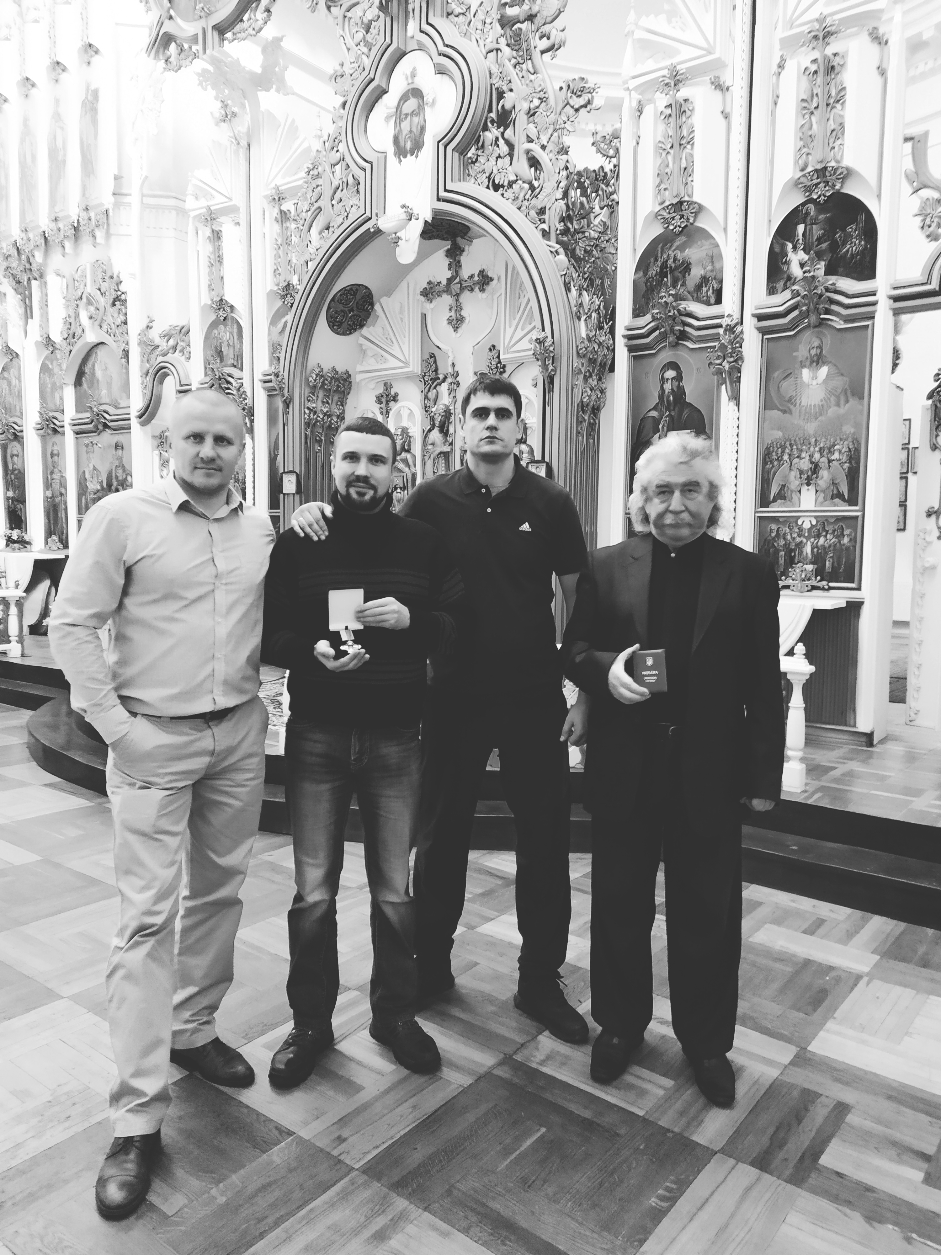 Вручення відзнаки Ігорю Криворучко. Ніжин 2020